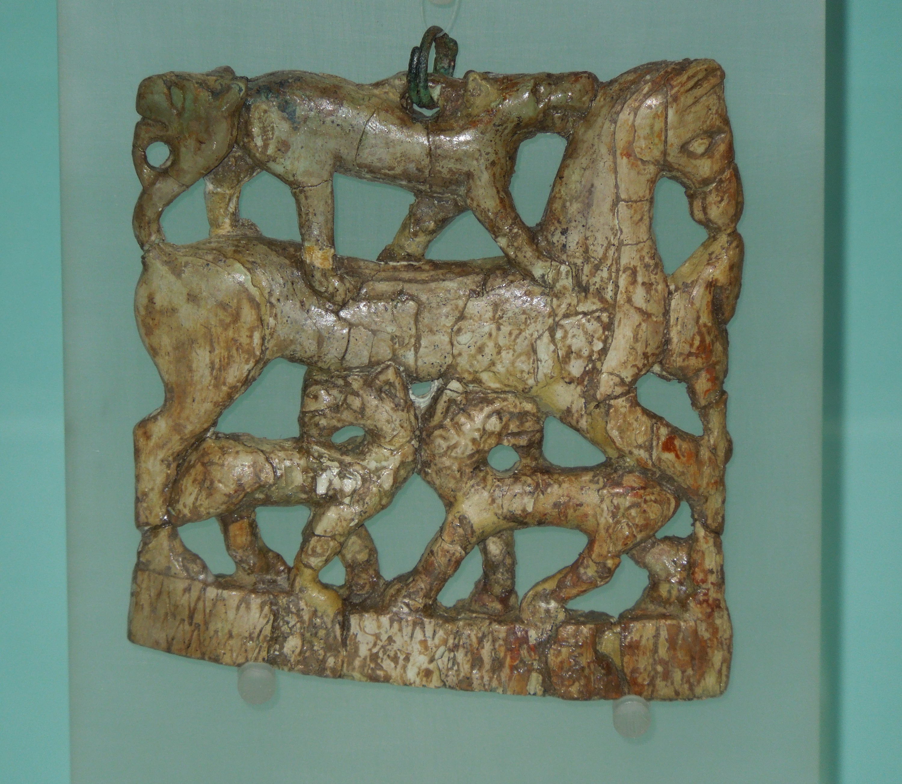 placca quadrangolare in avorio con figure zoomorfe proveneiente dalla tomba n. 127 della Necropoli di Campovalano in provincia di Teramo.